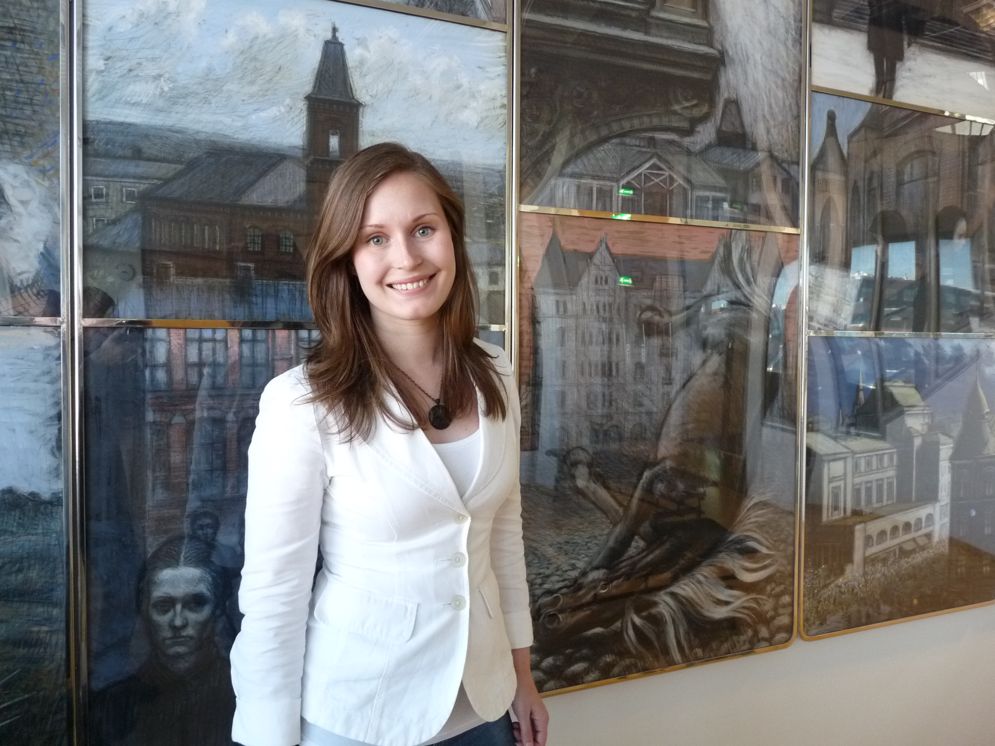 Sanna Marin, Tampereen kaupunginvaltuuston puheenjohtaja 2013–16